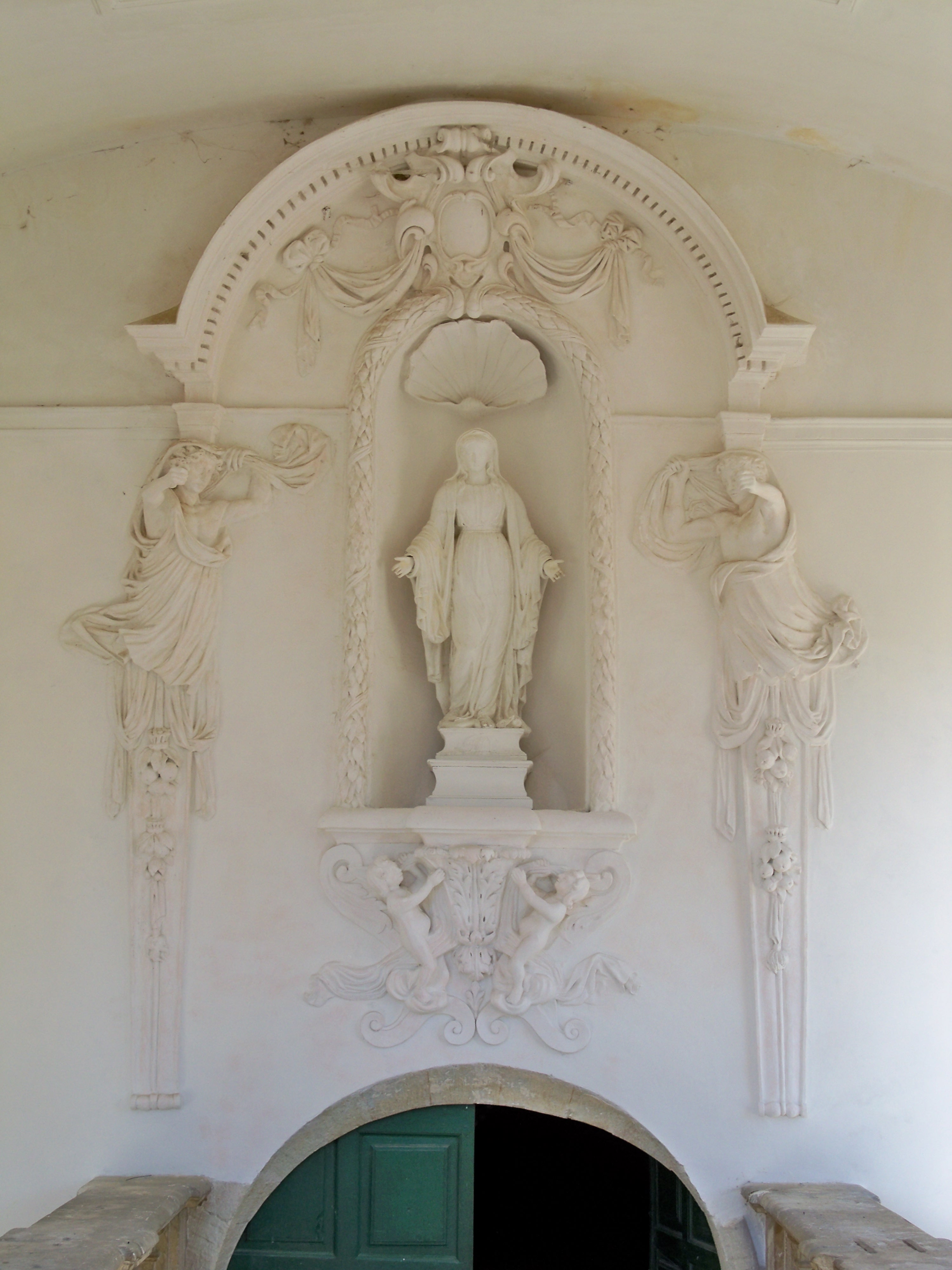 Chapelle Notre Dame de Pareloup à Mazan (84)